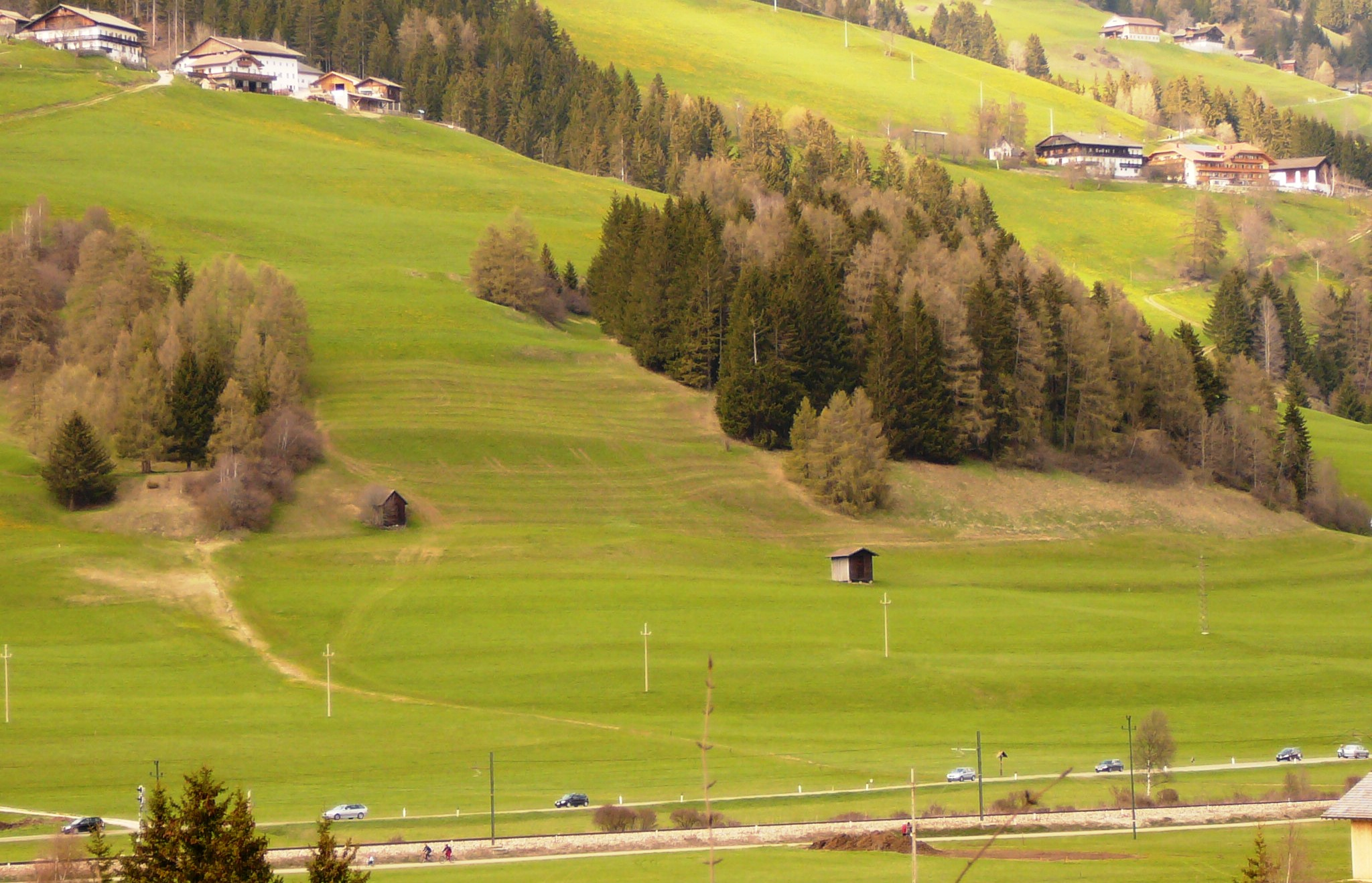 Panoramica della Costanosellari a Dobbiaco